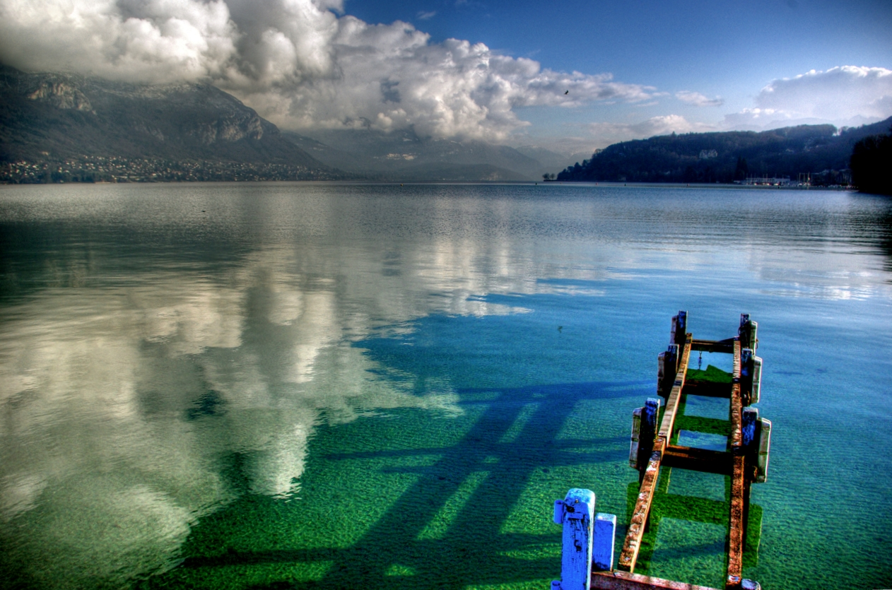 Lac d'Annecy